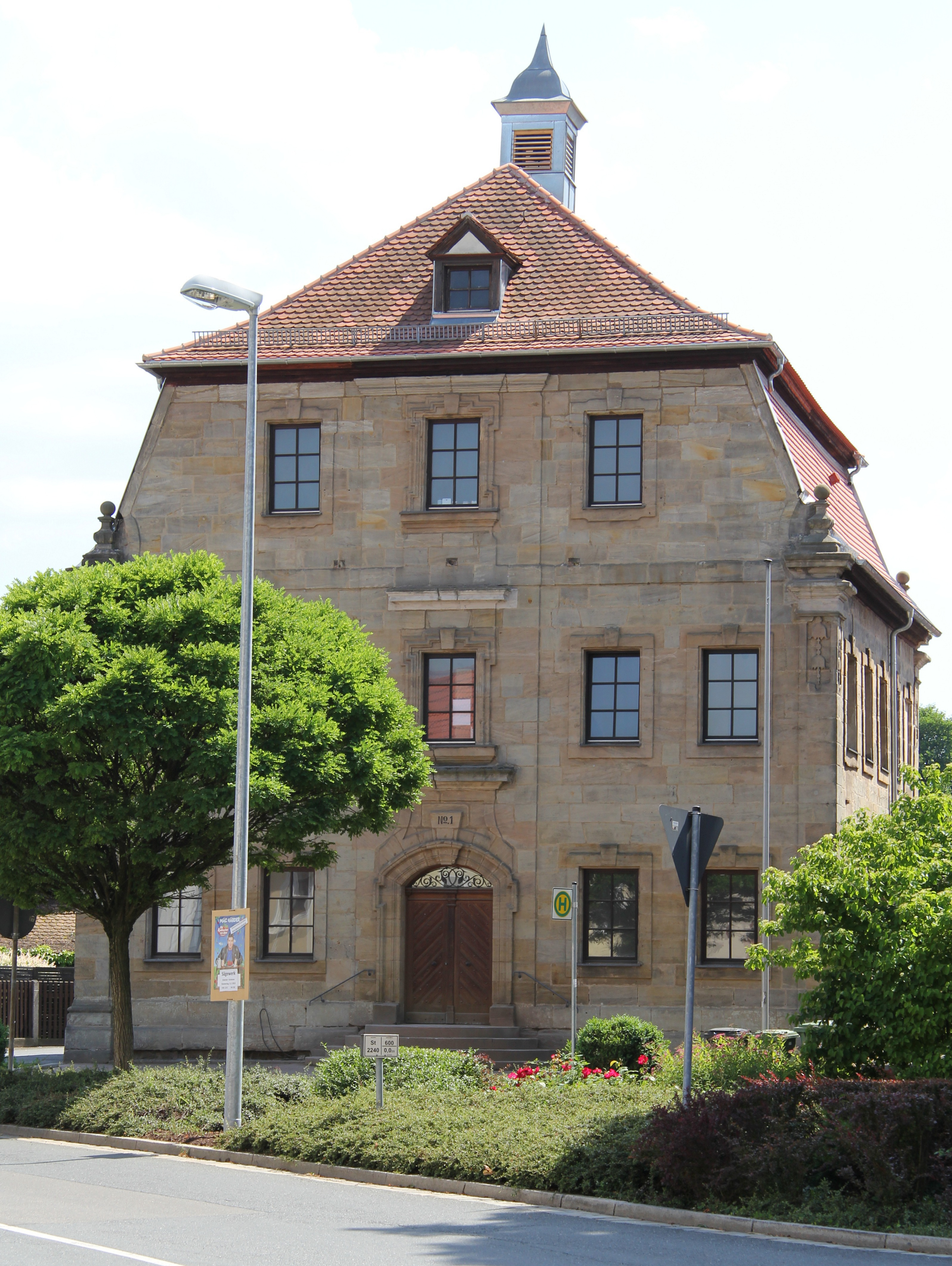 Ehemaliger Herrensitz, Brander Hauptstraße 12 in Eckental-Brand, Bayern; von vorne rechtsThis is a photograph of an architectural monument.